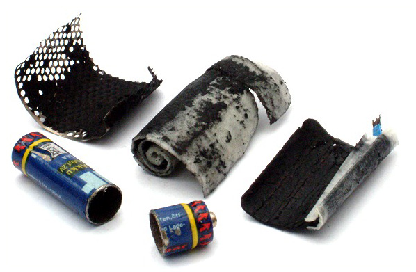 Nickel-Metalhydrid (NiMH) Akku